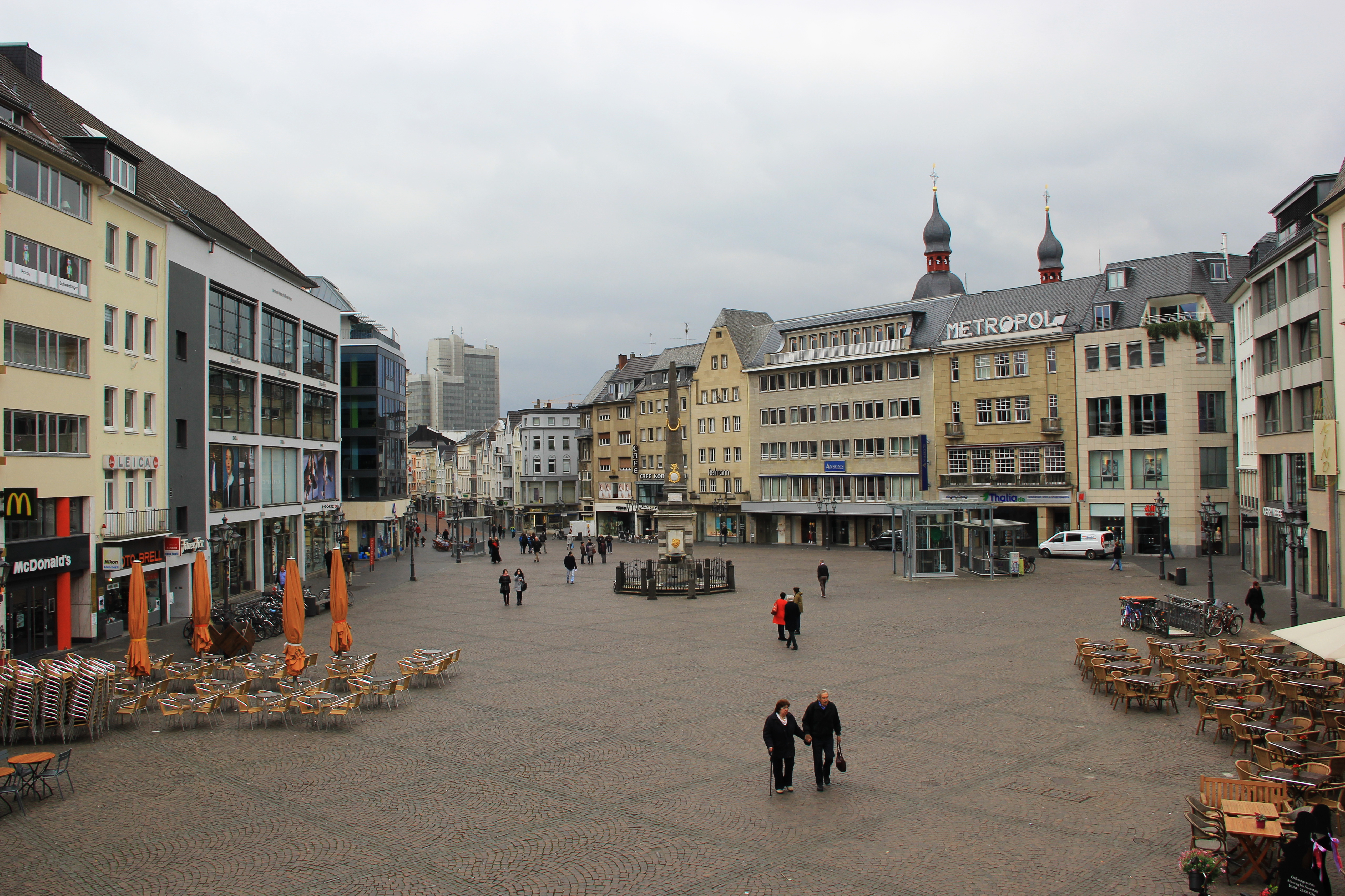 Fontainen-Obelisk auf dem Bonner Marktplatz.